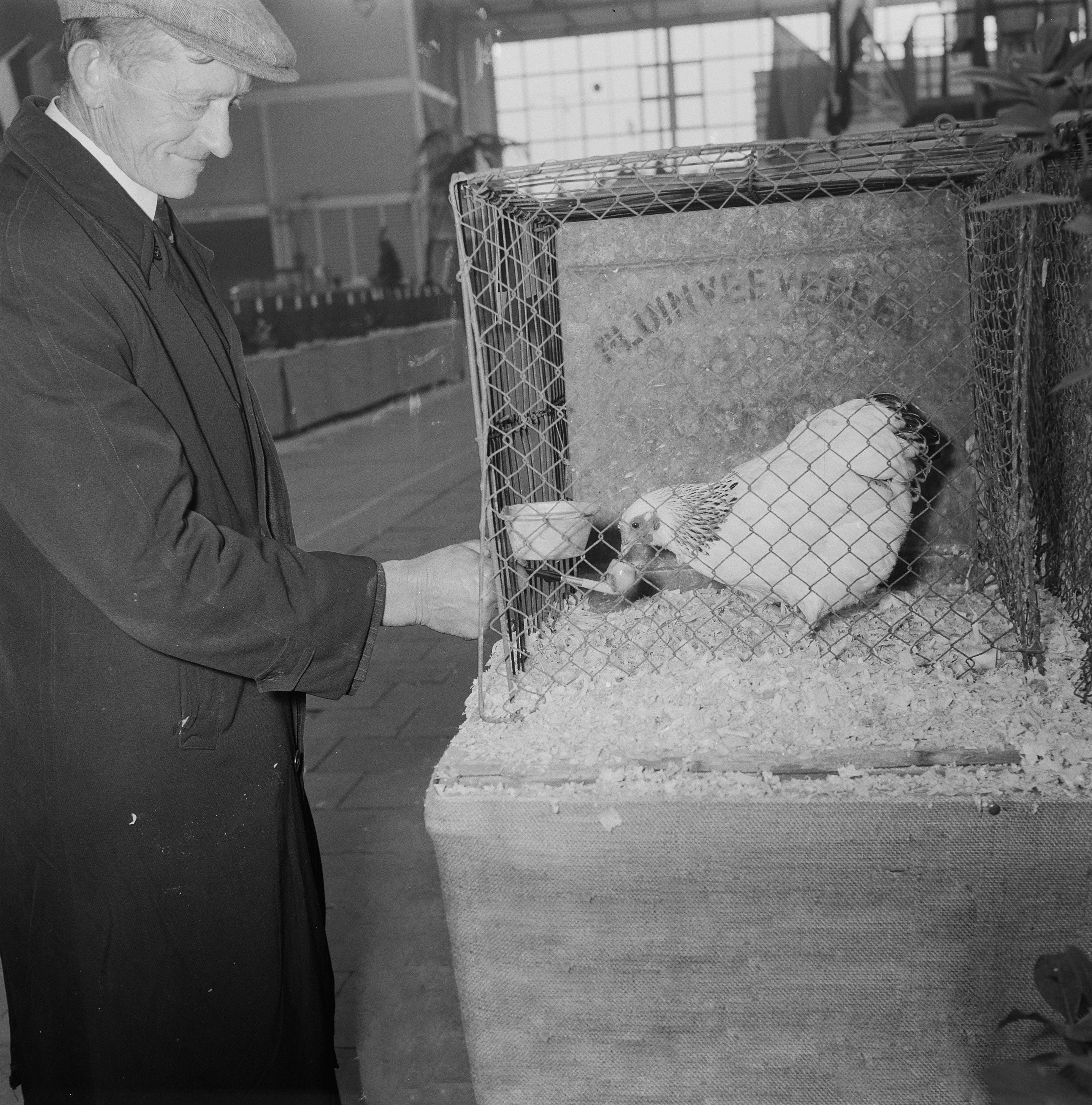 Collectie / Archief : Fotocollectie Anefo Reportage / Serie : [ onbekend ] Beschrijving : Pluimveetentoonstelling Amitophilia Utrecht Datum : 3 november 1955 Locatie : Utrecht Trefwoorden : pluimveetentoonstellingen Persoonsnaam : Amitophilia Fotograaf : Rossem, Wim van / Anefo Auteursrechthebbende : Nationaal Archief Materiaalsoort : Negatief (zwart/wit) Nummer archiefinventaris : bekijk toegang 2.24.01.03 Bestanddeelnummer : 907-4173